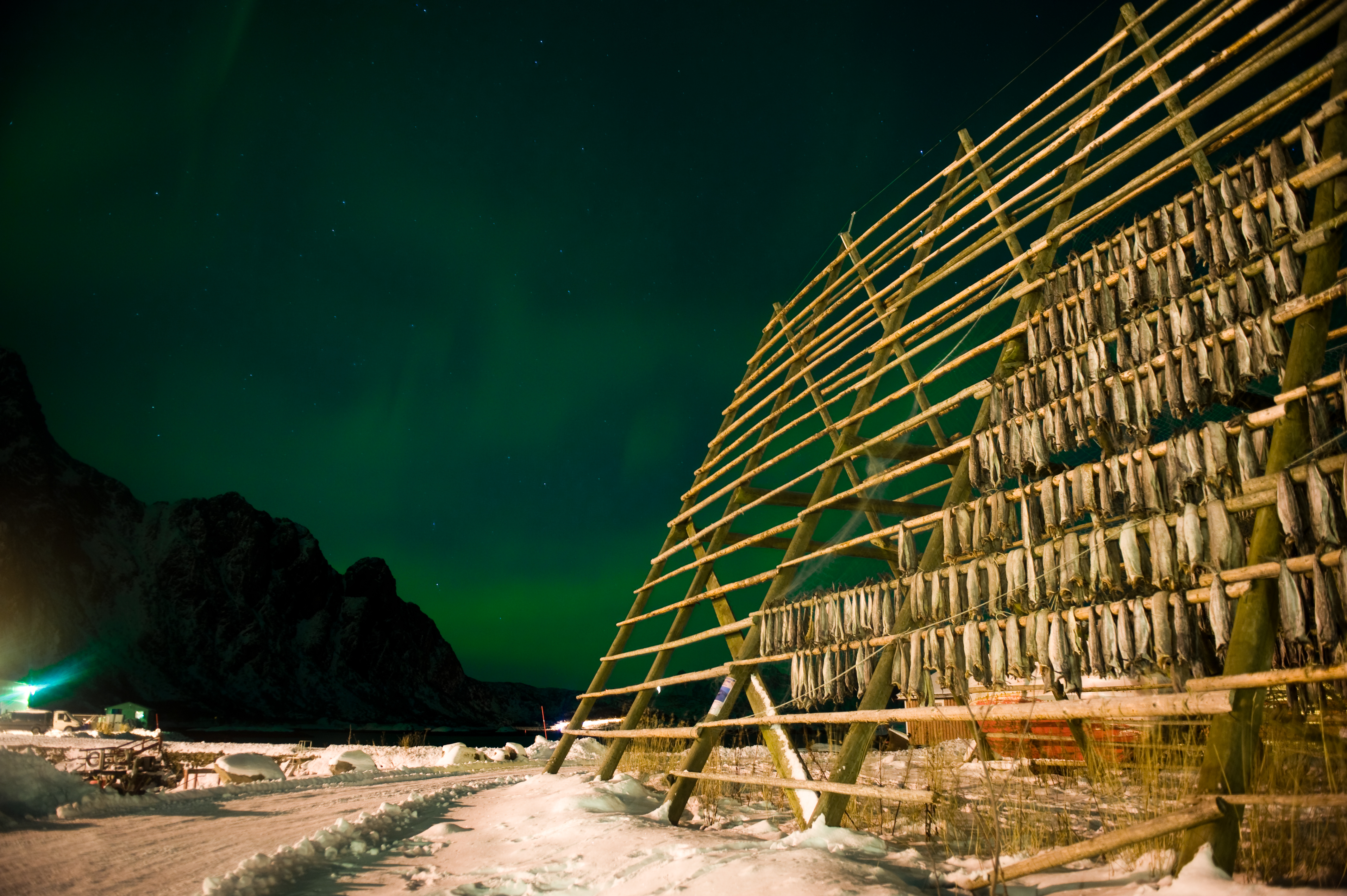 Velferdstjenesten i Bodø arrangerte velferdstur til Svolvær.